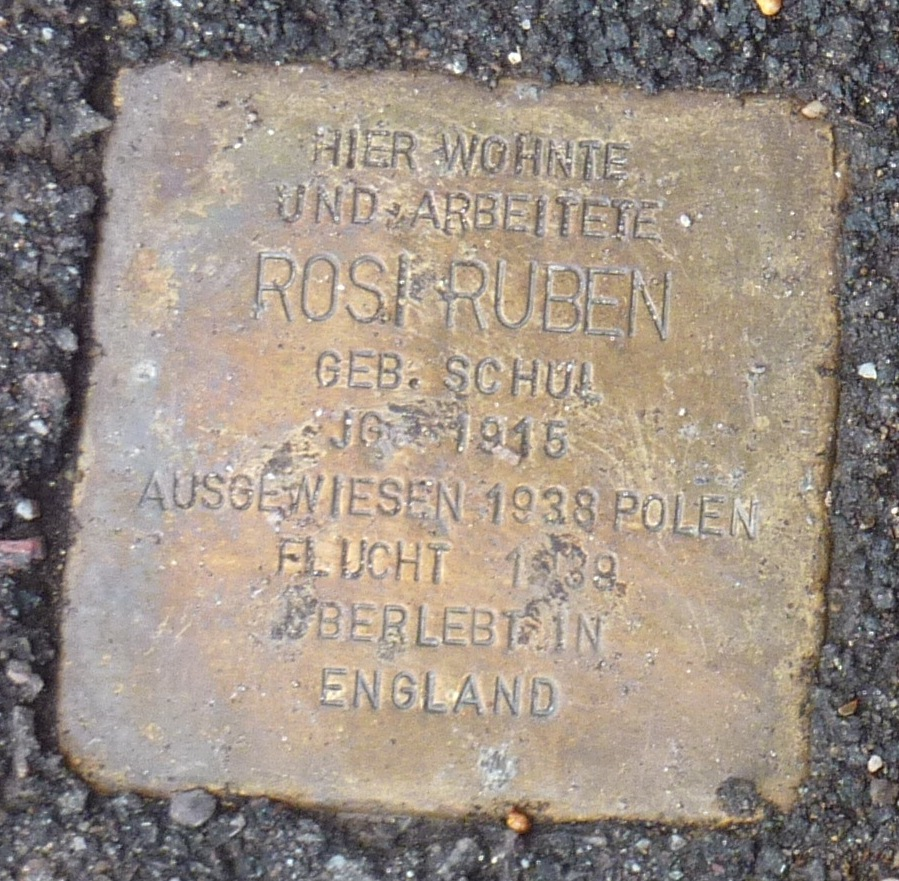 Stolperstein für Rosi Ruben